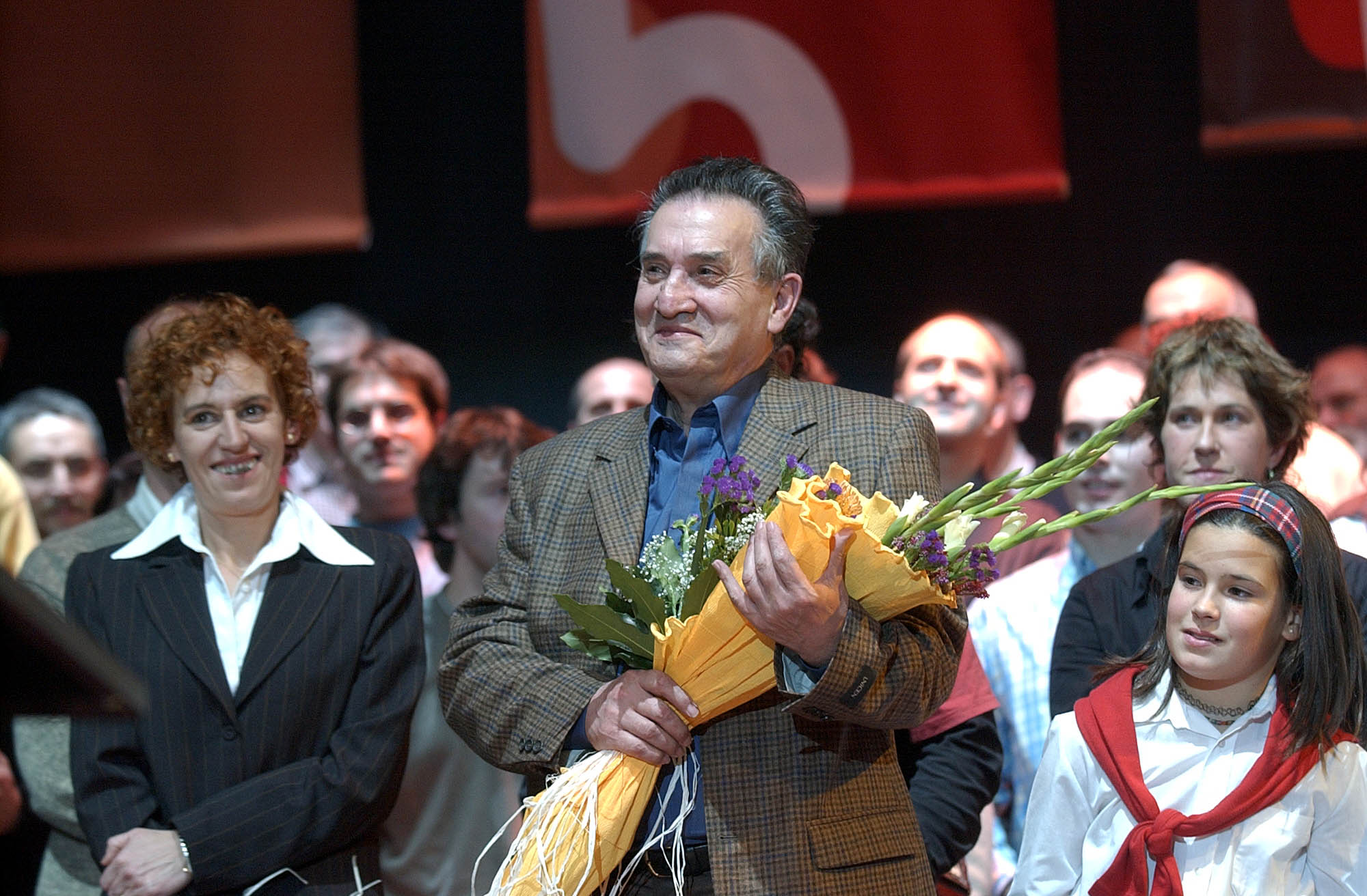 Homenaje al Musico y compositor Imanol Urbieta.